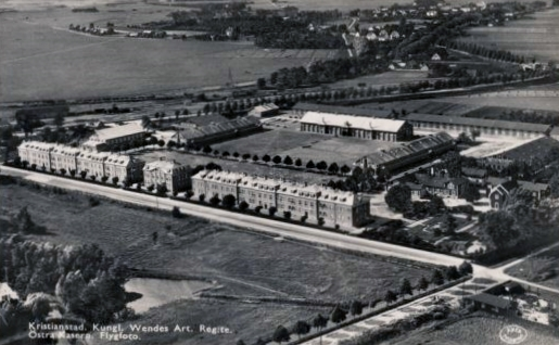 Östra kasernen i Kristianstad. Urspungligen uppförd till Wendes artilleriregemente.